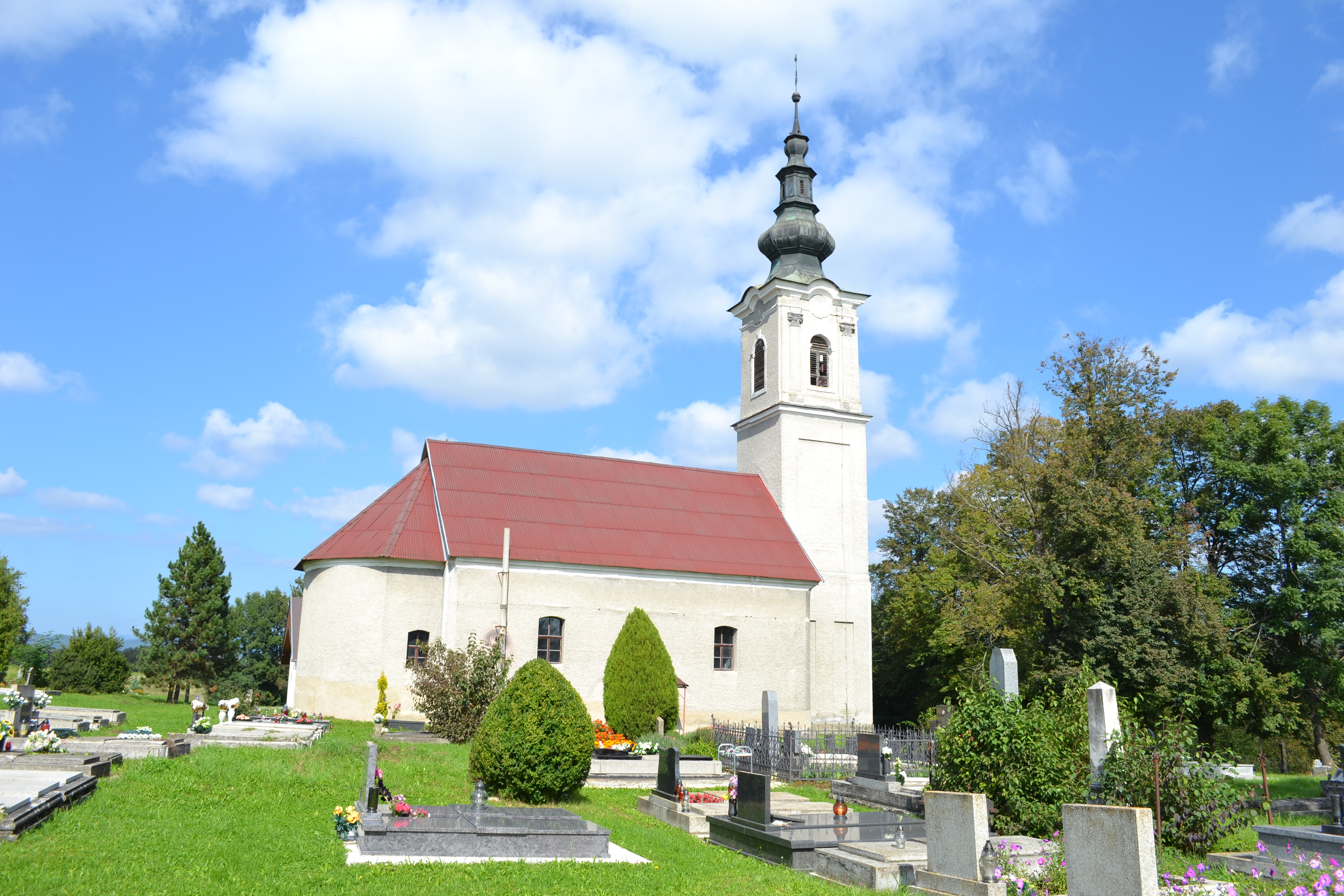 Klasicistický evanjelický kostol z roku 1790 s neskorobarokovým oltárom vo Veľkých Teriakovciach